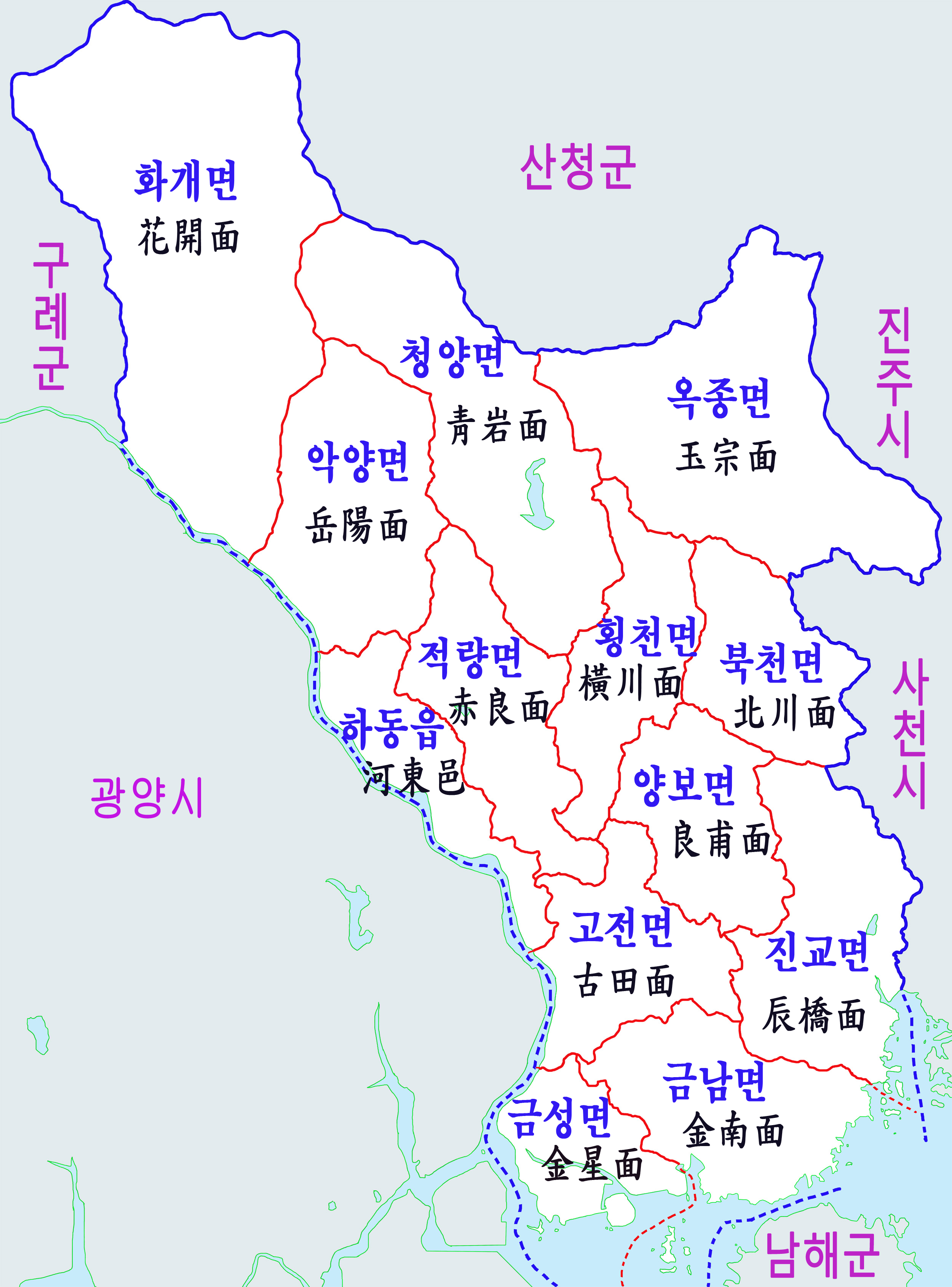 하동군 행정구역